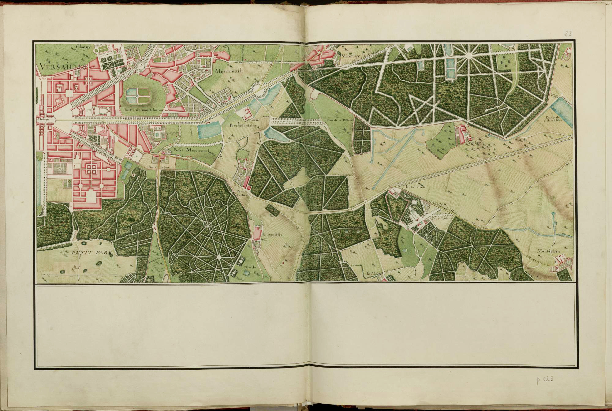 Atlas de Trudaine pour la généralité de Paris. Département de Versailles. Portion de route à partir du château de Versailles jusqu'à Viroflay d'un côté, et à l'étang de Villacoublay d'un autre côté, avec croisement du chemin de Guiancourt par Buc et embranchement à l'Hôtel-Dieu du chemin de Bièvre par Monteclain.